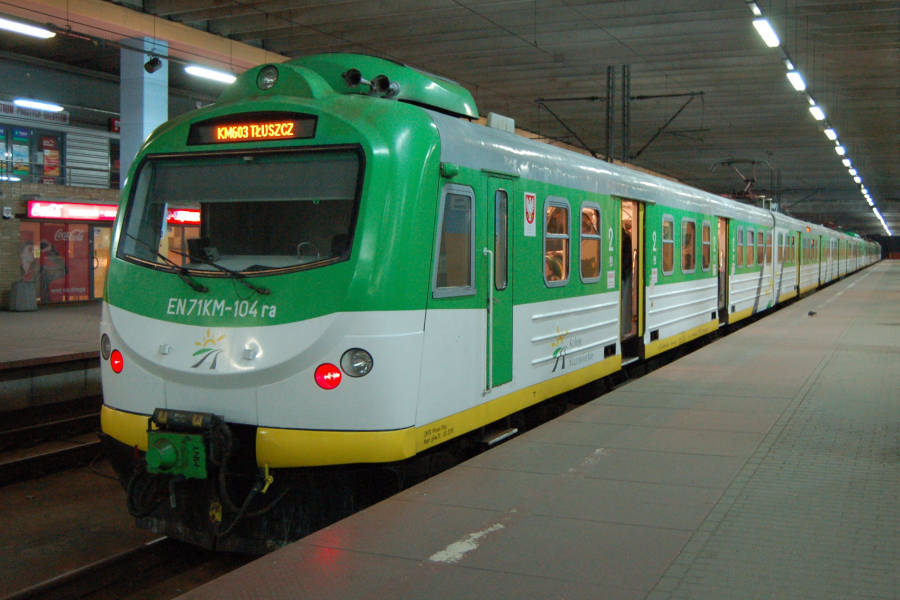 Elektryczny zespół trakcyjny EN71KM-104 stoi na stacji Warszawa Wileńska.